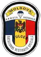 Batalionul Destinaţie Specială Independent